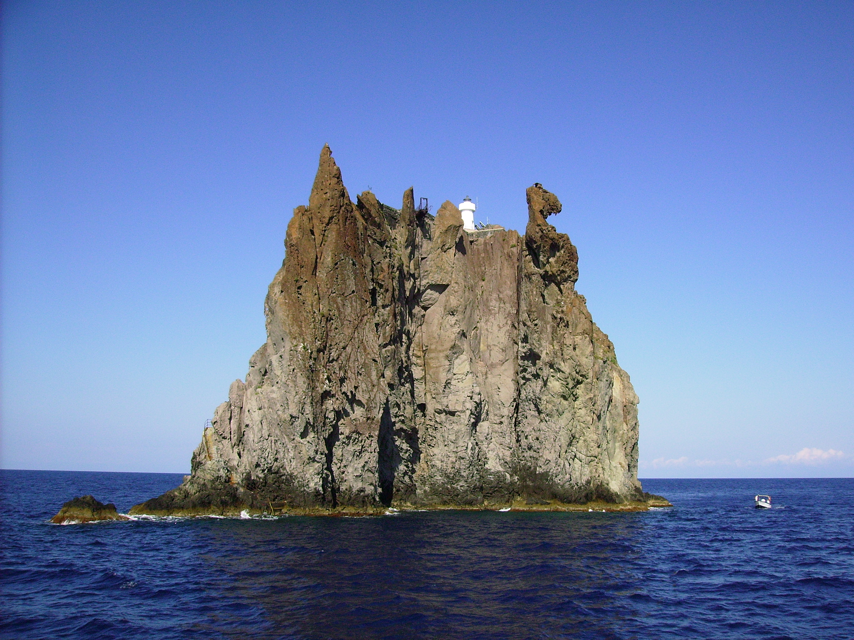 Strombolicchio -- Faro